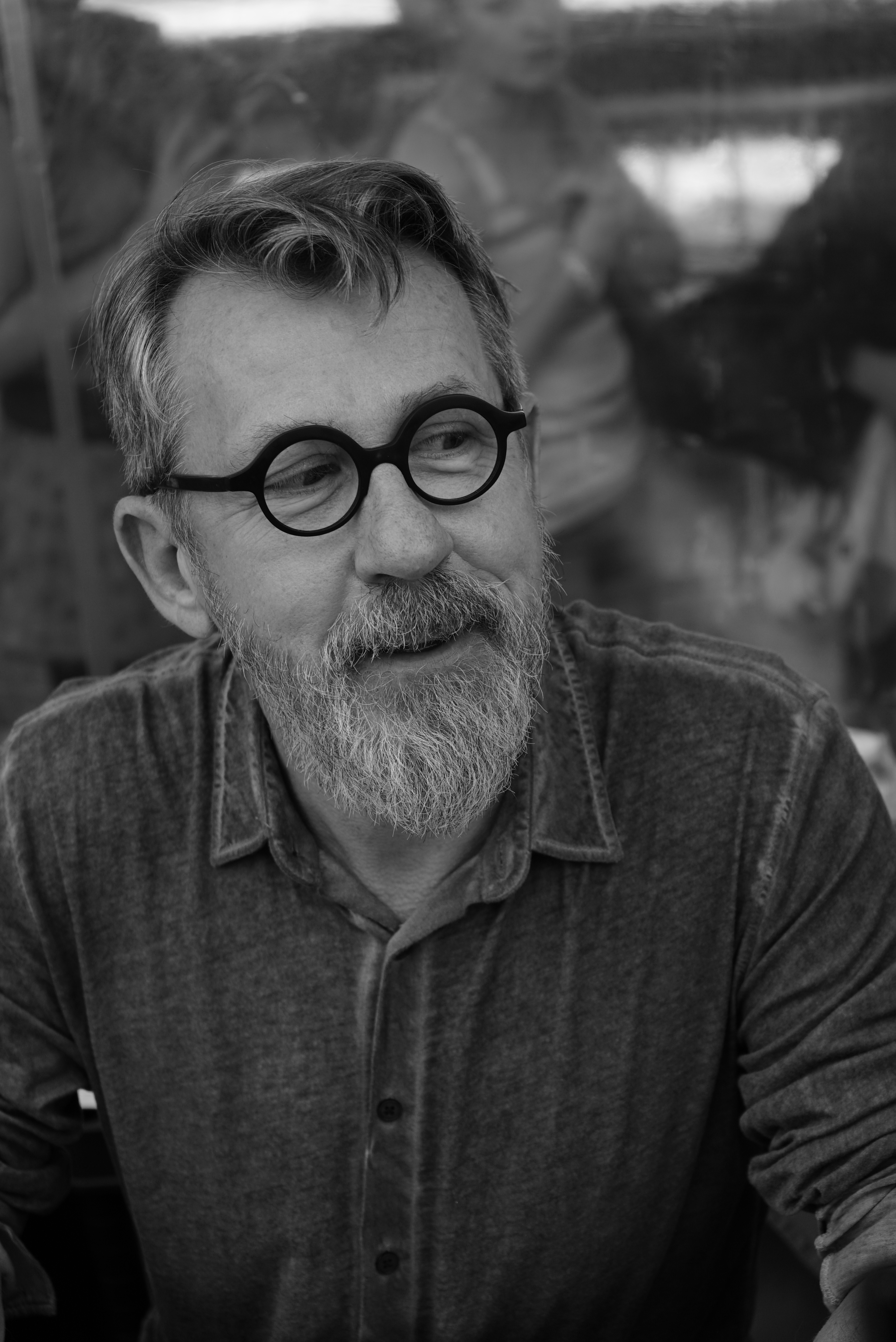 en dédicace à Nancy.